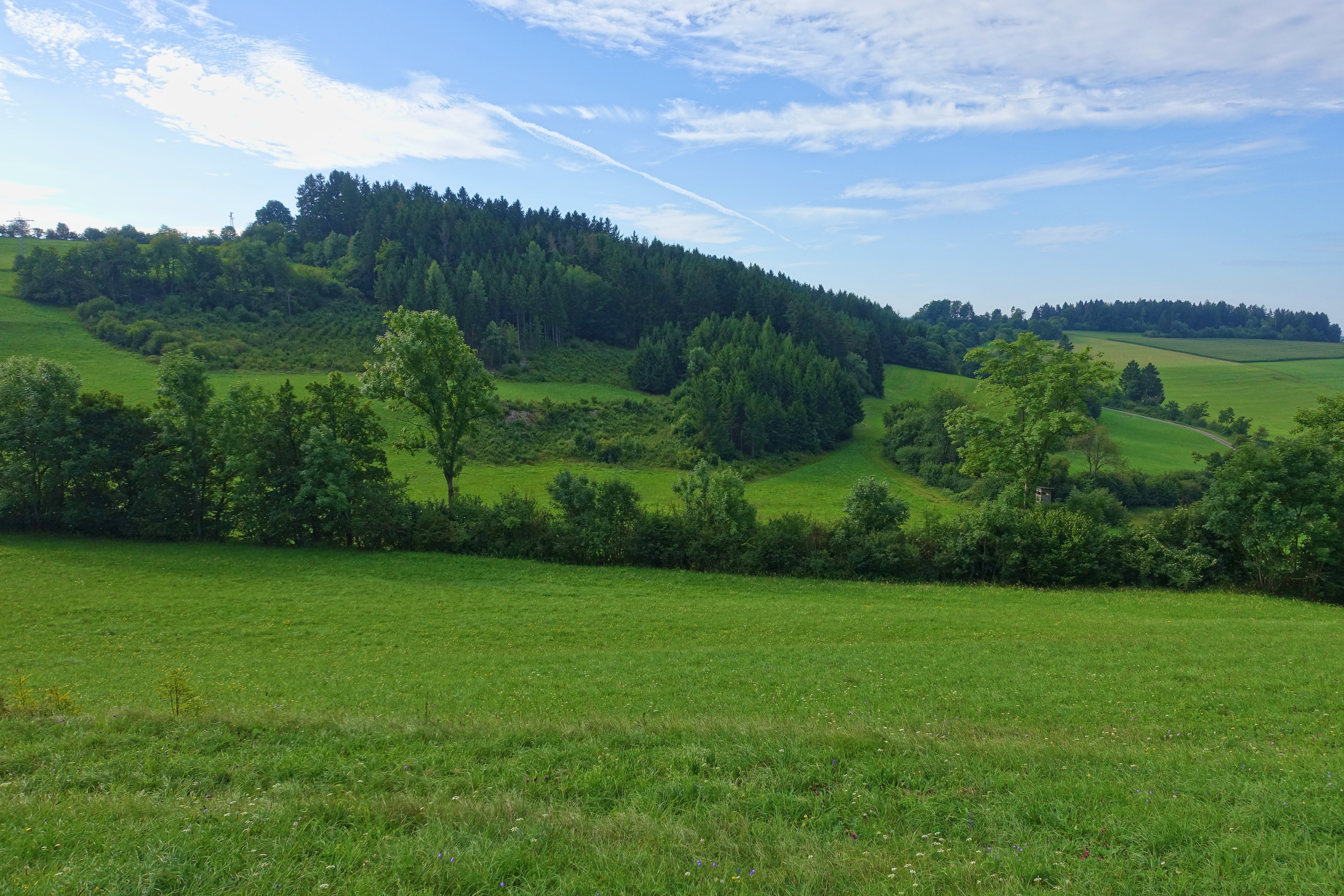 Heckenlandschaft mit ausgedehnten, schützenswerten Kalkmagerrasen, Feuchtgebieten und Saumgesellschaften.